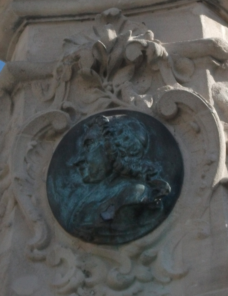 médaillon de jean_Godinot_sur la fontaine qu'il offrit à la ville de Reims, sur la place qui porte maintenant son nom.